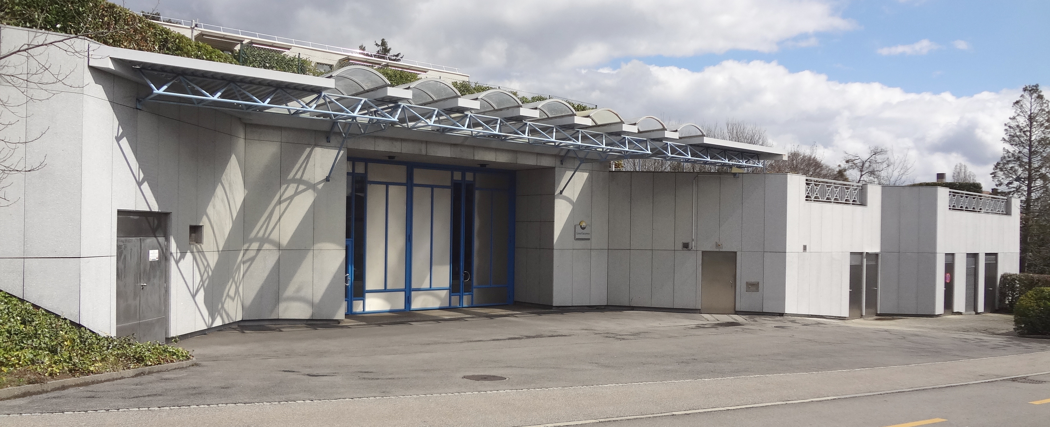 Réservoirs pour l'eau potable situés au Grand-Saconnex, au long de l'Ancienne-Route. Inaugurés en juin 1995 par les Services industriels de Genève, ils ont une capacité de 20'000 mètres cubes.